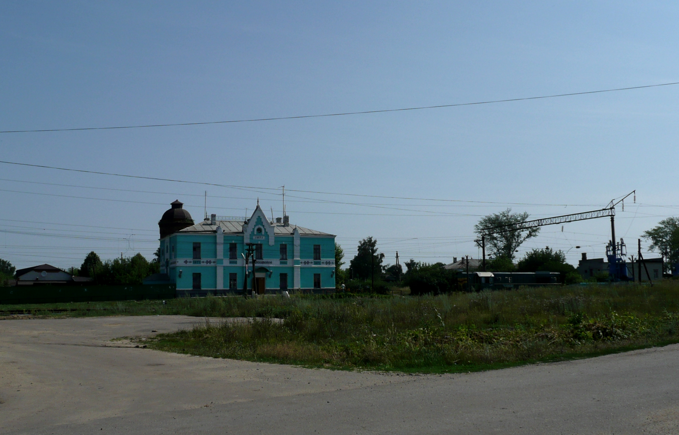 Утраченный вид здания вокзала Милославское.